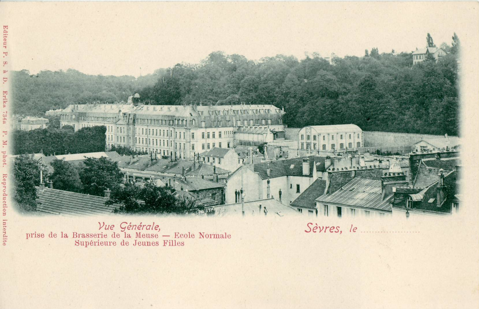 Carte postale ancienne, éditée par P. S. à D. Erika, P. M. Phot n°734a :Sèvres : Vue générale prise de la Brasserie de la Meuse - Ecole normale supérieure de jeunes filles